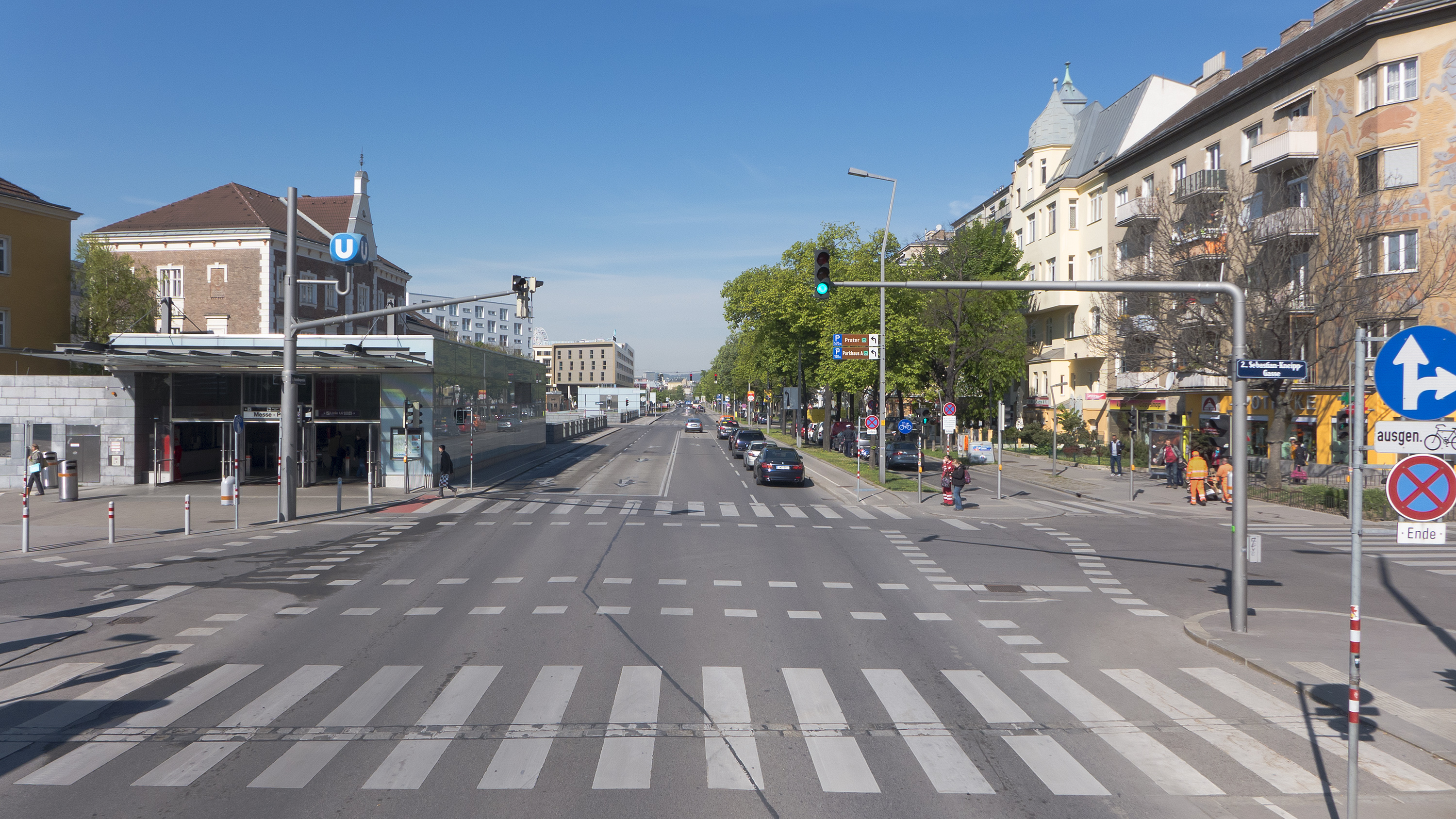 Ausstellungsstraße in Wien 2 beim Messeplatz Richtung Westen